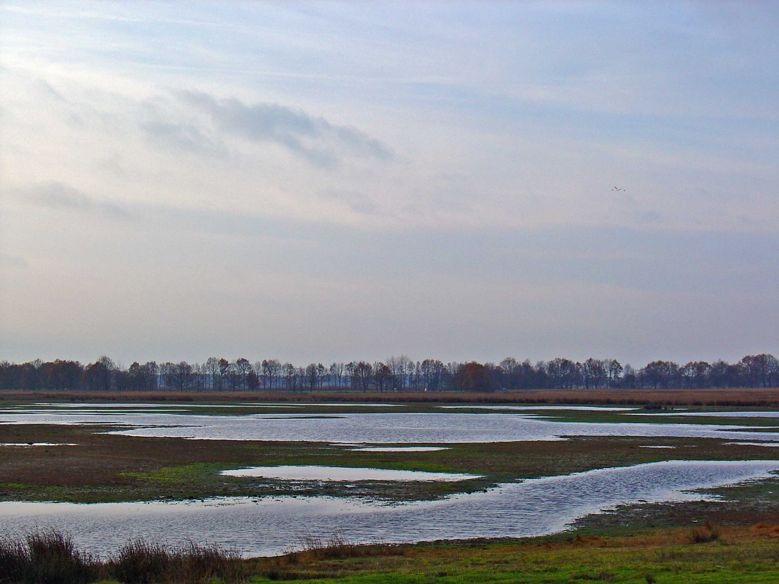 Boekweitenplas in het Scharreveld, natuurgebied in Drenthe